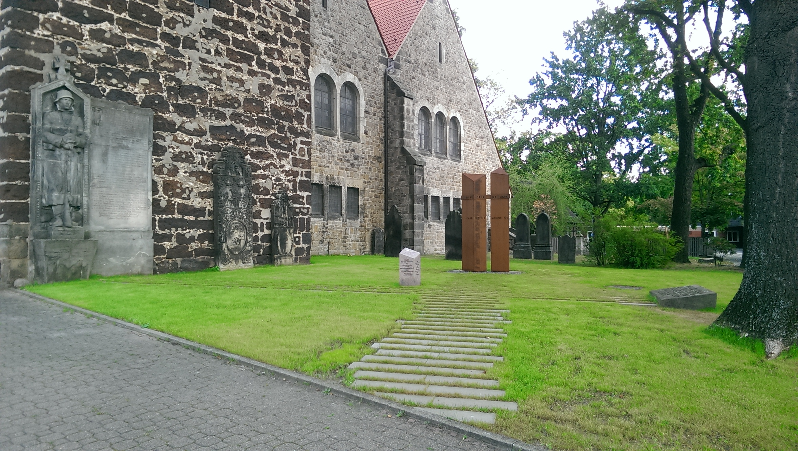 Neugestaltung 2019 des Friedensmahnmals für den 1. und 2. Weltkrieg als neuer GehDenkWeg